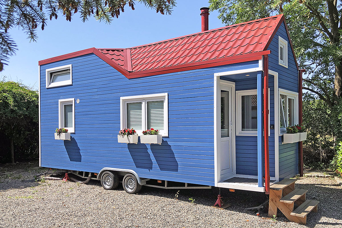 Tiny House auf PKW-Anhänger Maximal zulässige Maße: 4,00 m Höhe und 2,55 m Breite. Länge über alles 8,9 m. Gesamtgewicht bis 3,5 to. Dynamischer Festigkeitsnachweis (gepr. Karosseriestatik) Baustatik, Baubeschreibung, Wärmeschutzberechnung für offizielles Baugenehmigungsverfahren.